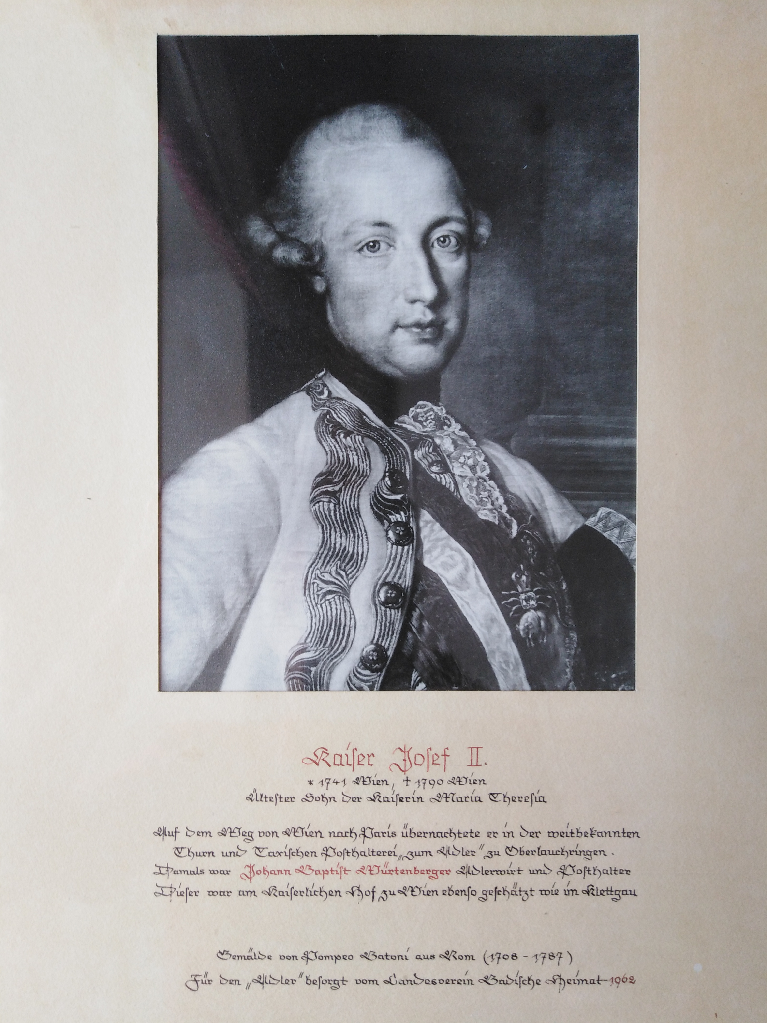 Gasthaus Adler in Lauchringen im Landkreis Waldshut in Baden-Württemberg. Ersterwähnung im Habsburger Urbar 1308. Gedenkblatt zur Übernachtung von Kaiser Joseph II. (1741—1790) 1781 im Adler auf einer Reise von Wien nach Paris mit einem Gemälde von Pompeio Baltoni (1708—1787) mit Widmung des Landesvereins Badische Heimat, 1962.